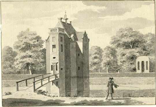 Gezicht op het huis Remmerstein bij Rhenen uit het zuidoosten.